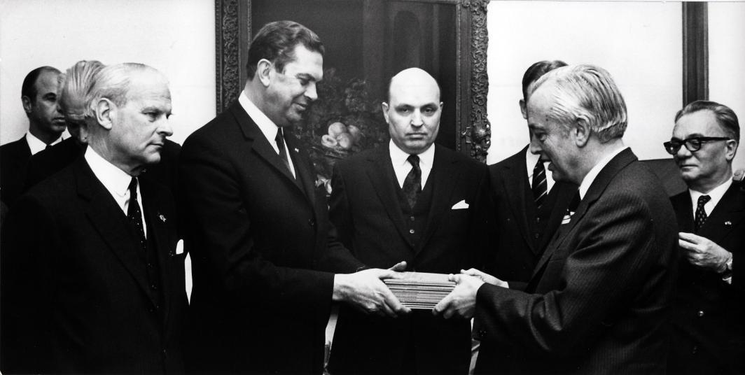 Vlnr de heren Minister de Koster, Premier Biesheuvel, de heer Neuman, de heer Rijckevorsel en de heer Goedhart bij de uitreiking van het rapport van de commissie-Rijckevorsel op het Catshuis in Den Haag. Nederland, 27 maart 1972.